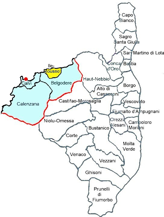 Localisation du canton de l’Ile-Rousse, L'Isula, Balagna, Haute-Corse